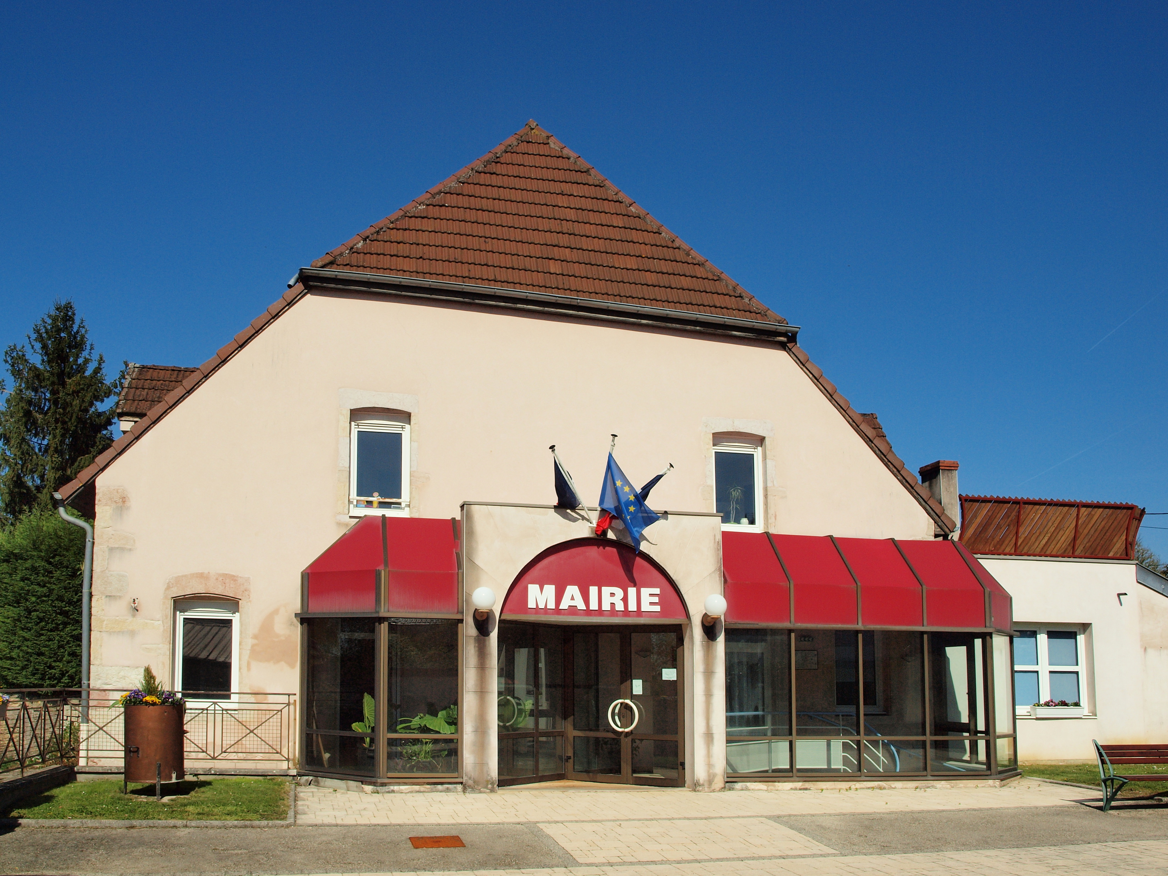 Monnières (Jura, France)